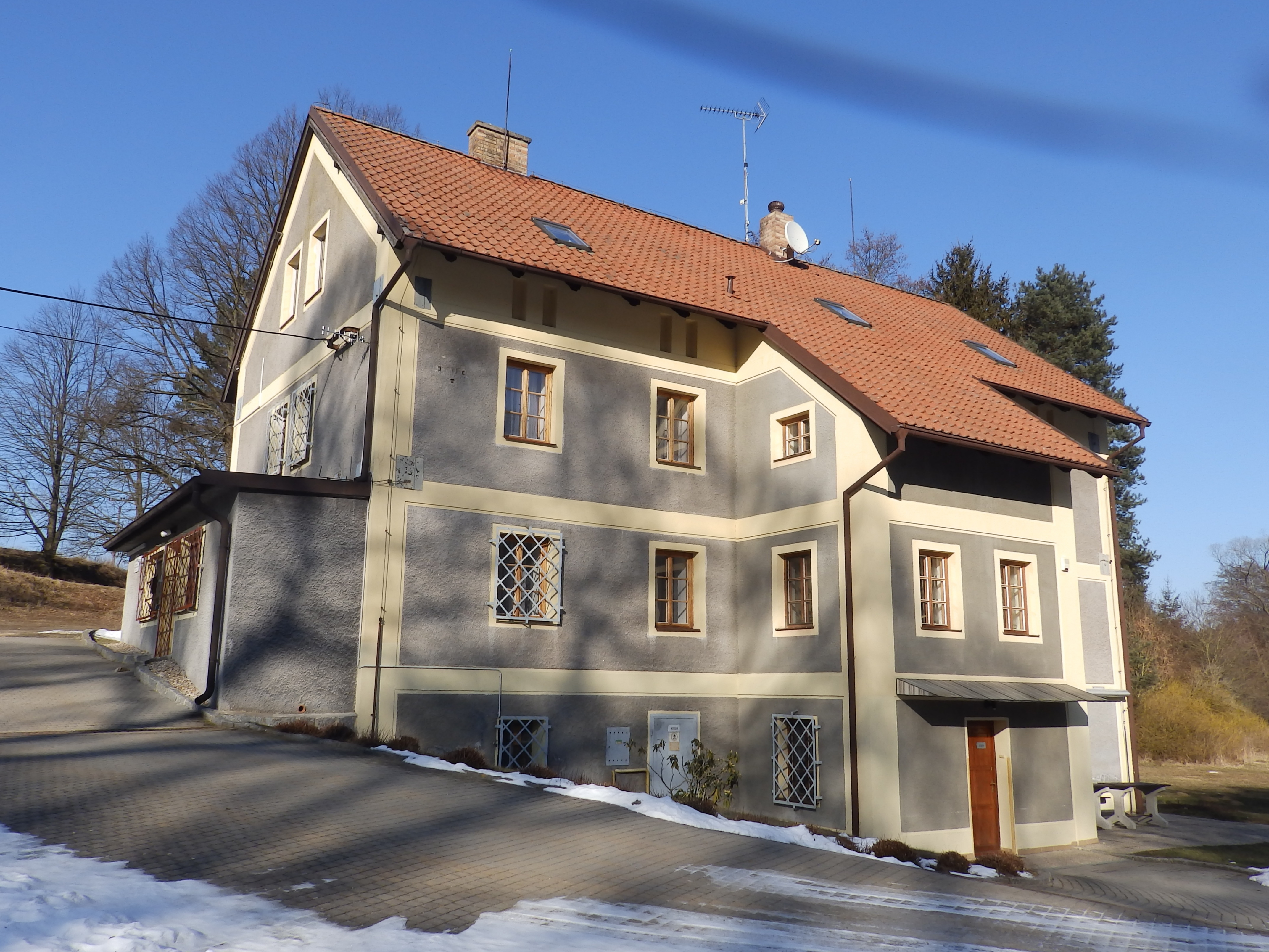 Křešický mlýn